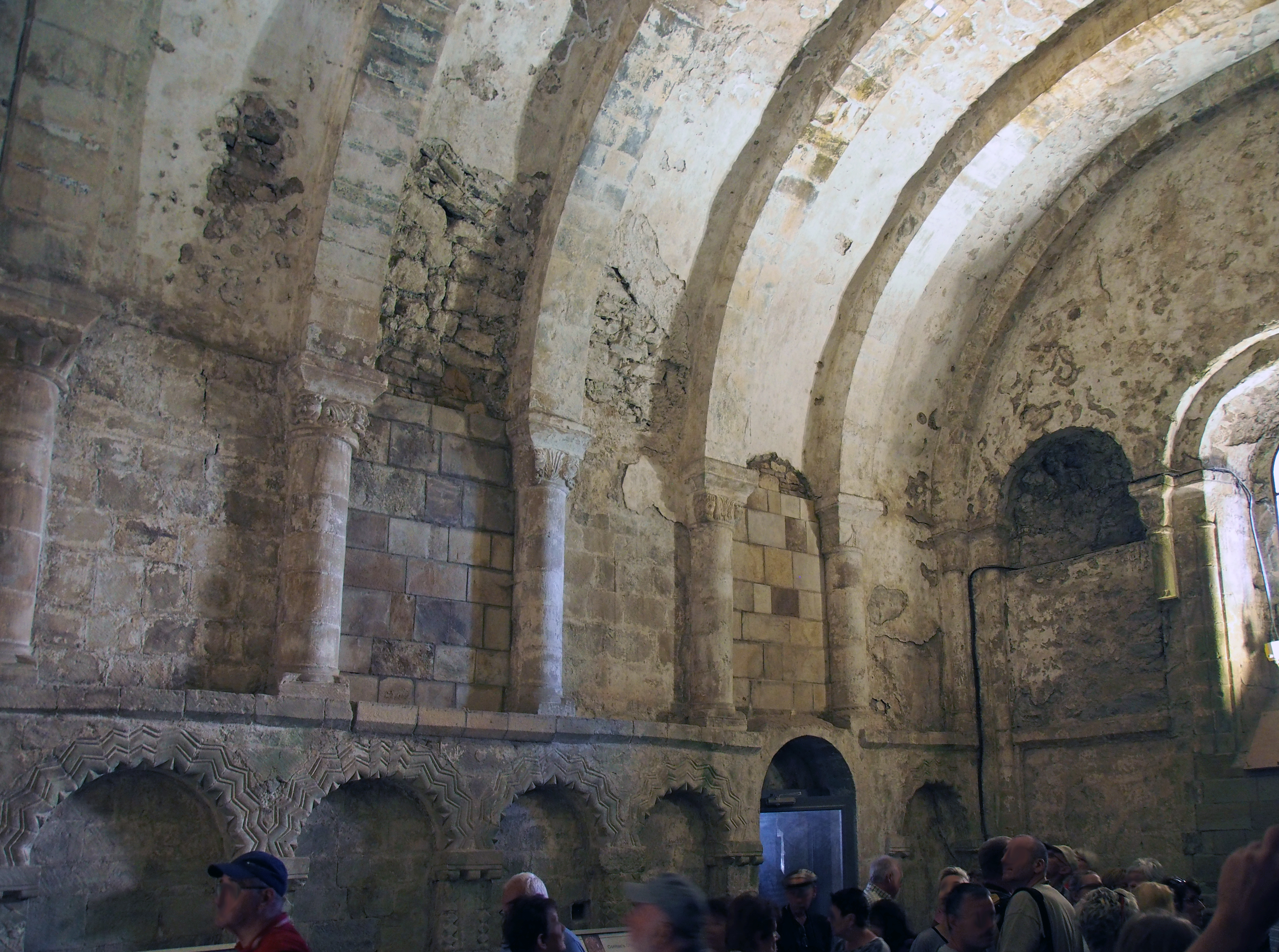 Cormac's Chapel, Rock of Cashel, County Tipperary Irland